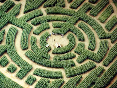 Het Labyrint van Barvaux (Durbuy, België), een trekpleister in de Ardennen.